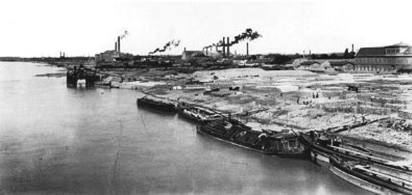 Az újpesti Dunapart 1890.-ben Még nem készült el a rakpart.